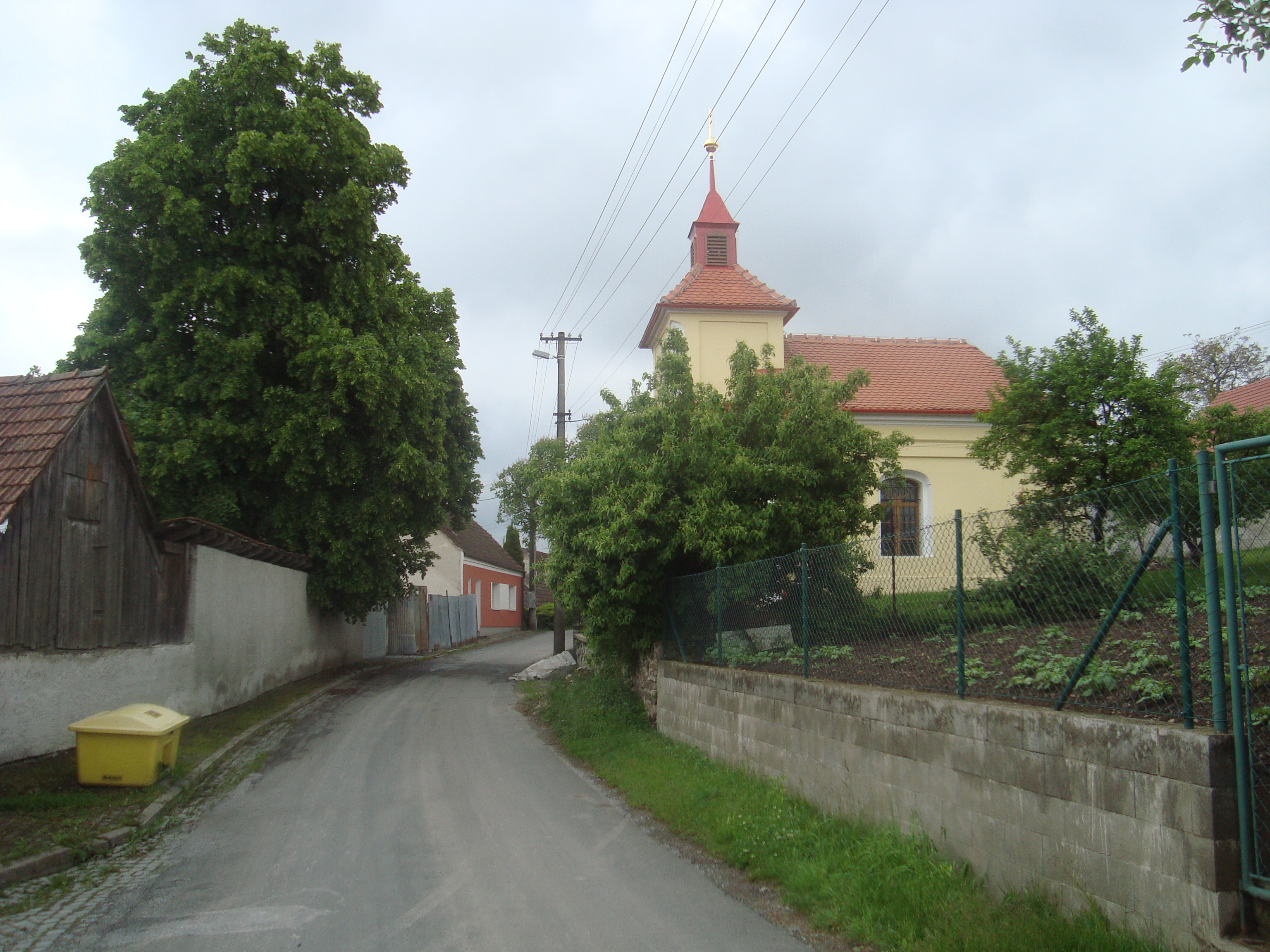 Braníškov